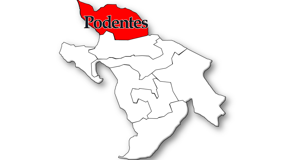 População